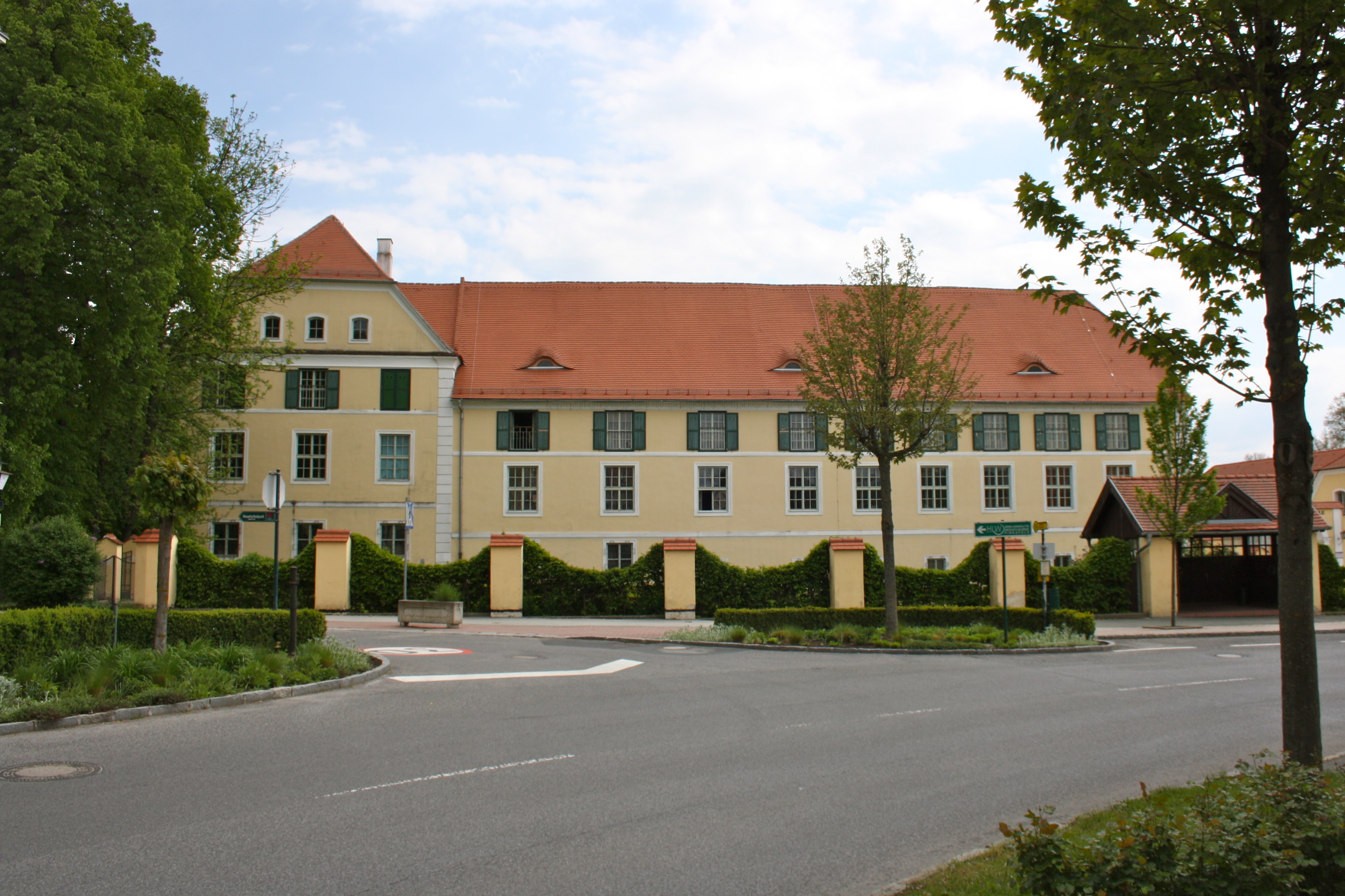 Ehem. Schloss Batthyány - heute Landesberufsschule